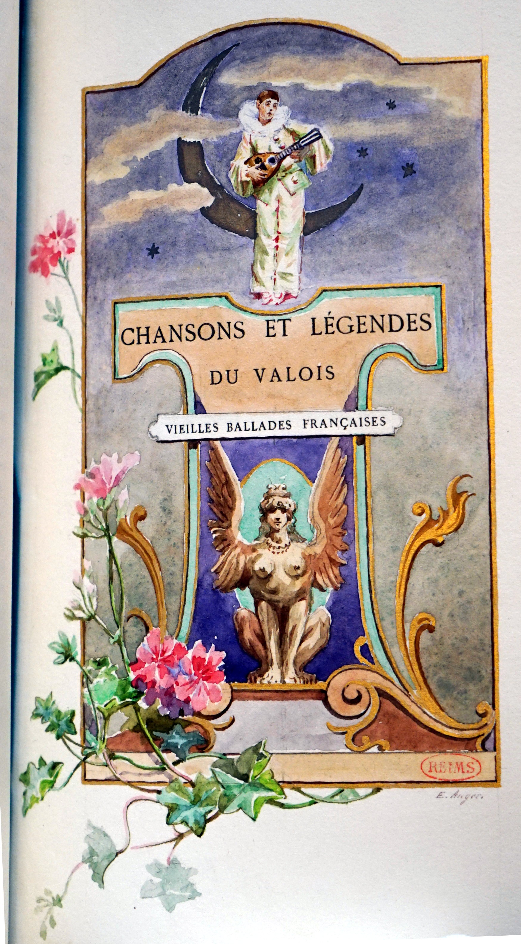 édition illustrée par Auger pour Diancourt.